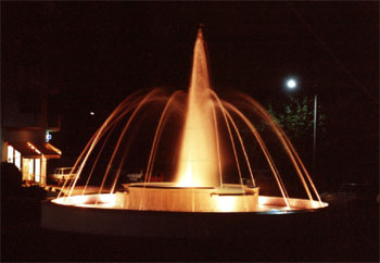 Largo das Três Bicas em Proença-a-Nova - Portugal.